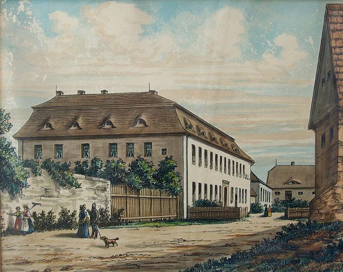 farbige Lithographie um 1860